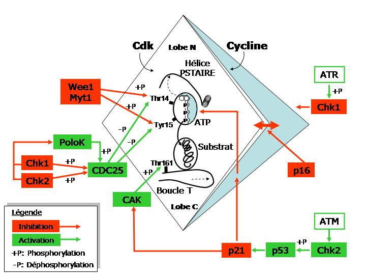 Description: Les mécanismes du cycle cellulaire: Les complexes Cdk-Cycline et les kinases activatrices et réductrices. Source: Michel Hamels. Michel Hamels 23 mai 2006 à 11:26 (CEST)